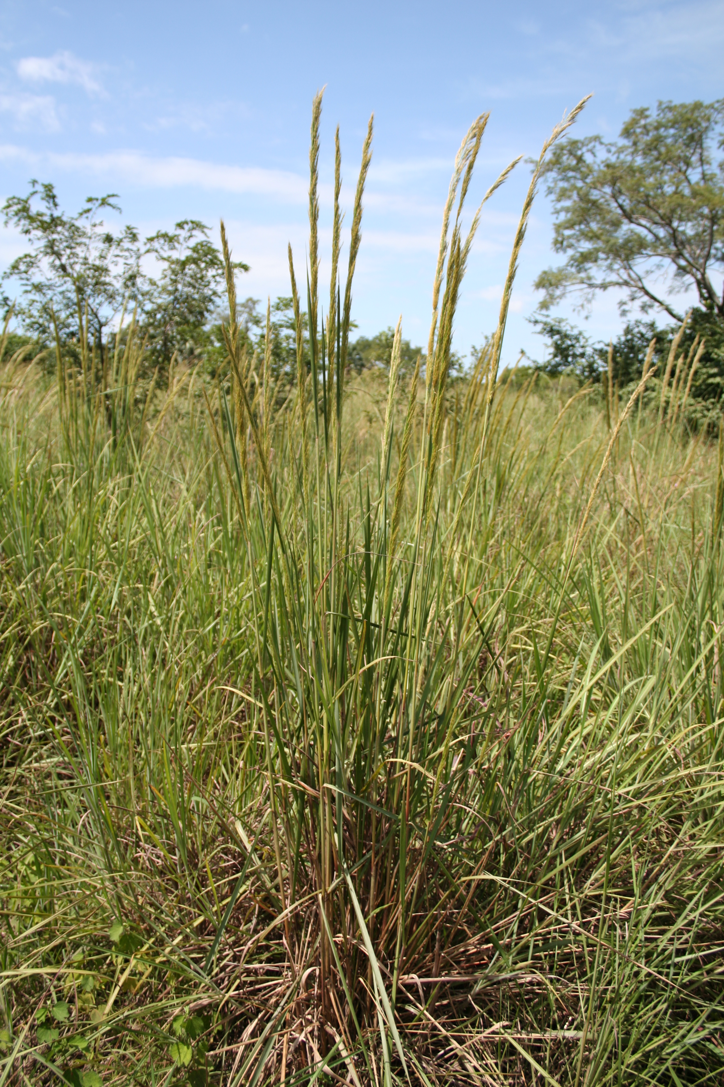 Panicum phragmitoides, Burkina Faso